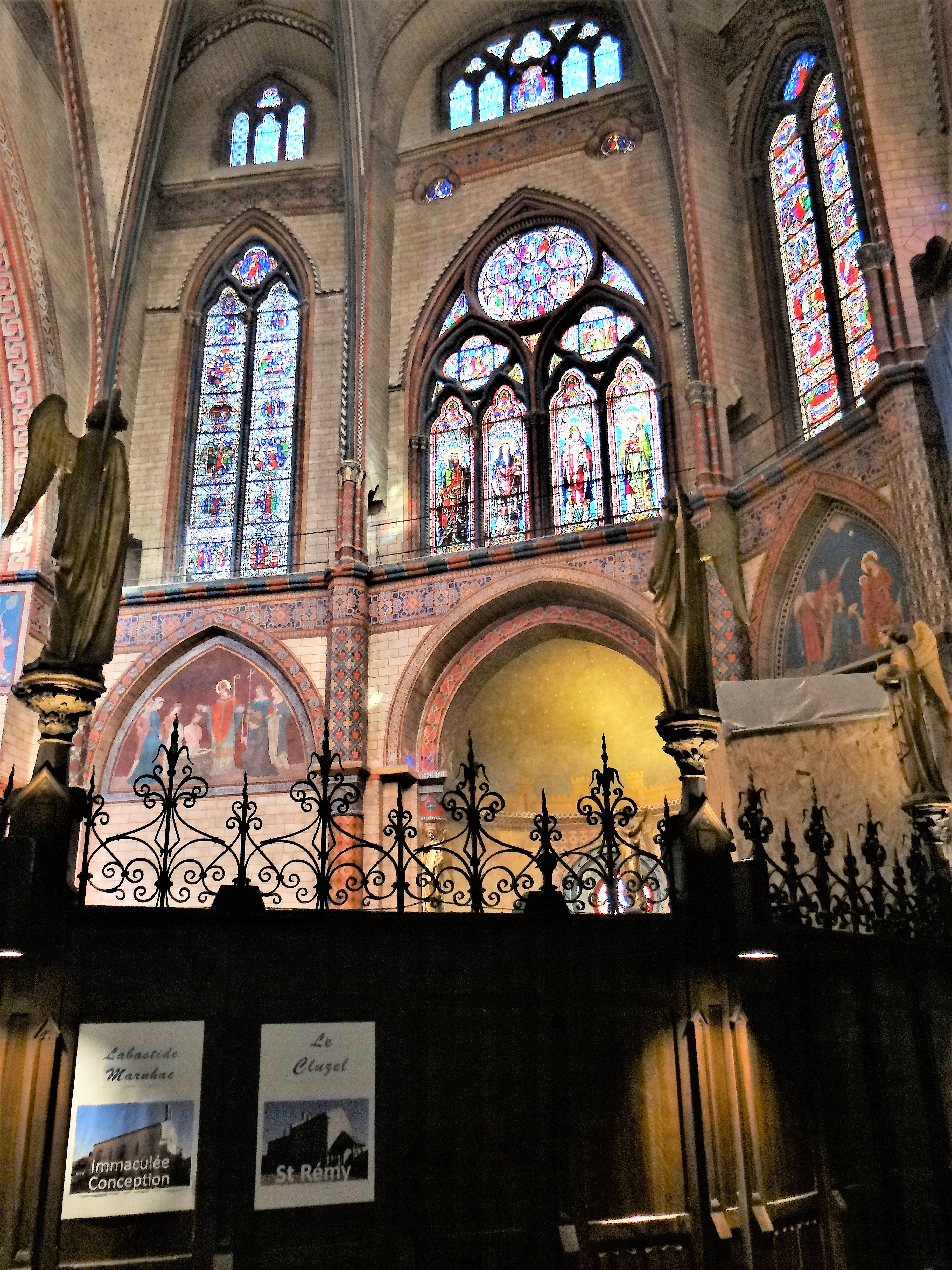 Cahors - Cathédrale Saint-Étienne - Chœur - Élévation